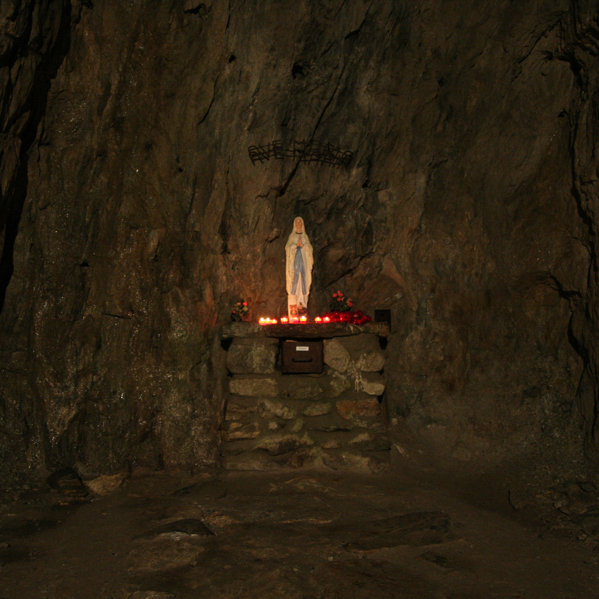 Der Marienaltar im Tälligrattunnel.